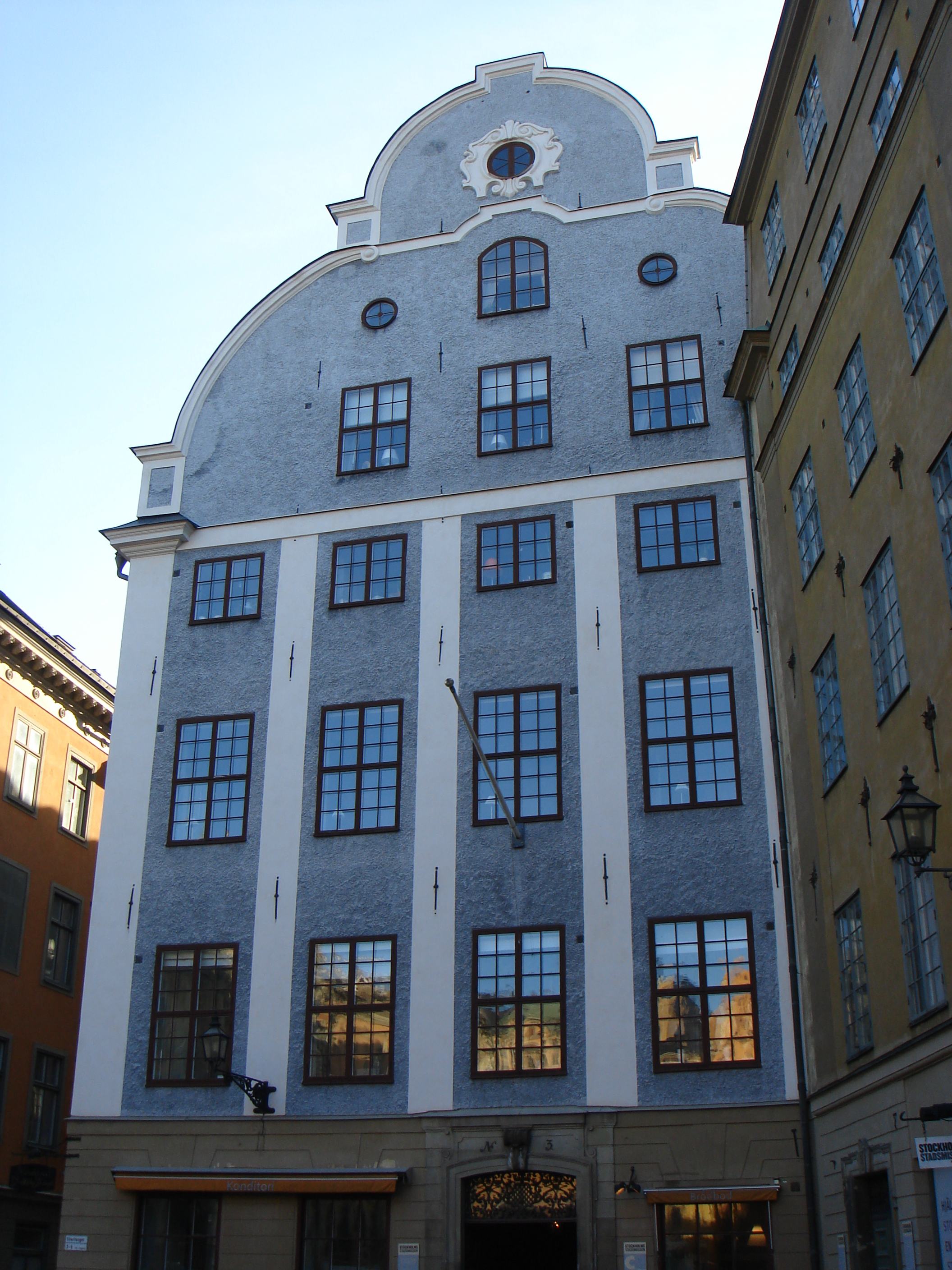 Grillska huset, Gamla stan, Stockholm